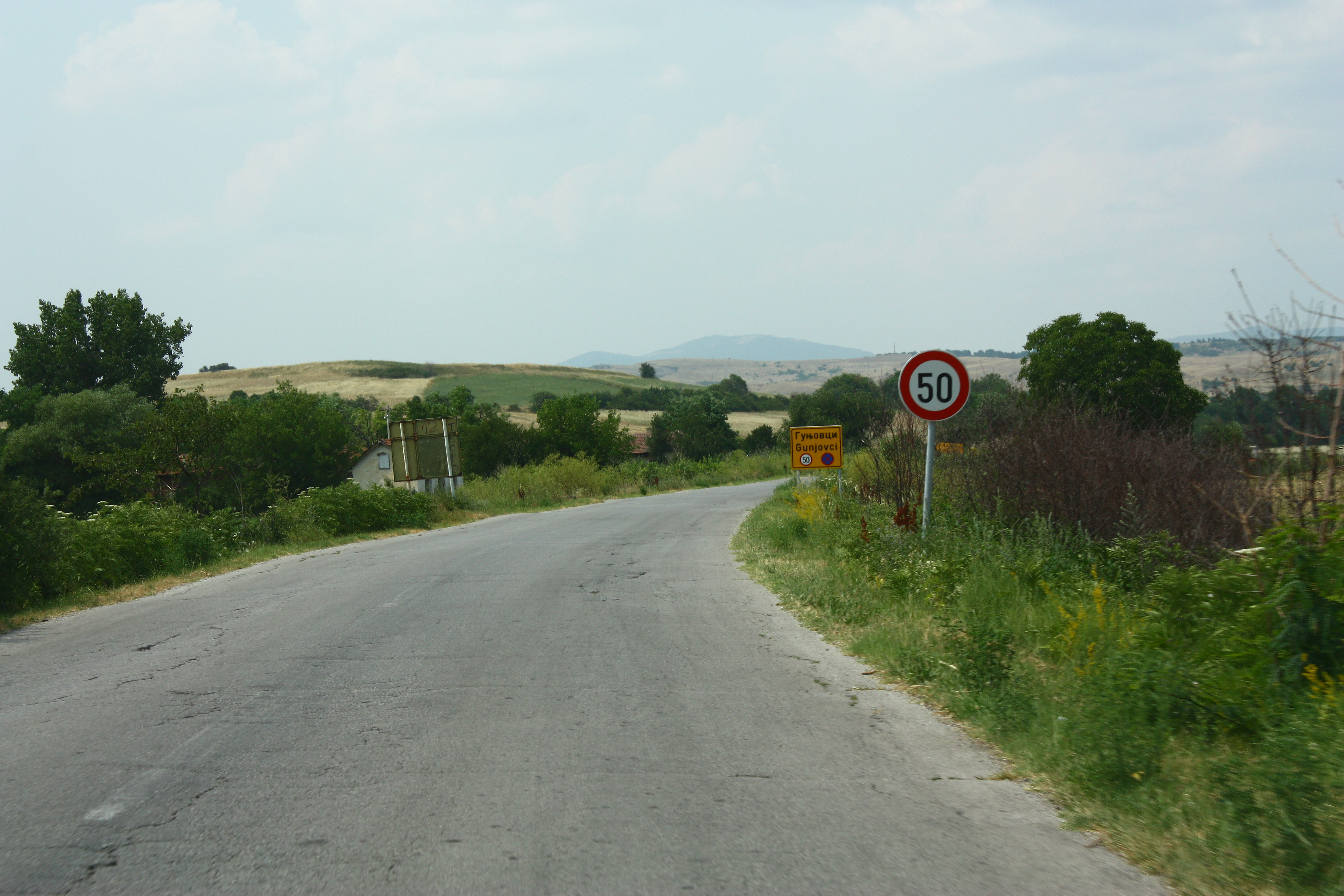 Gunjovci, Macedonia